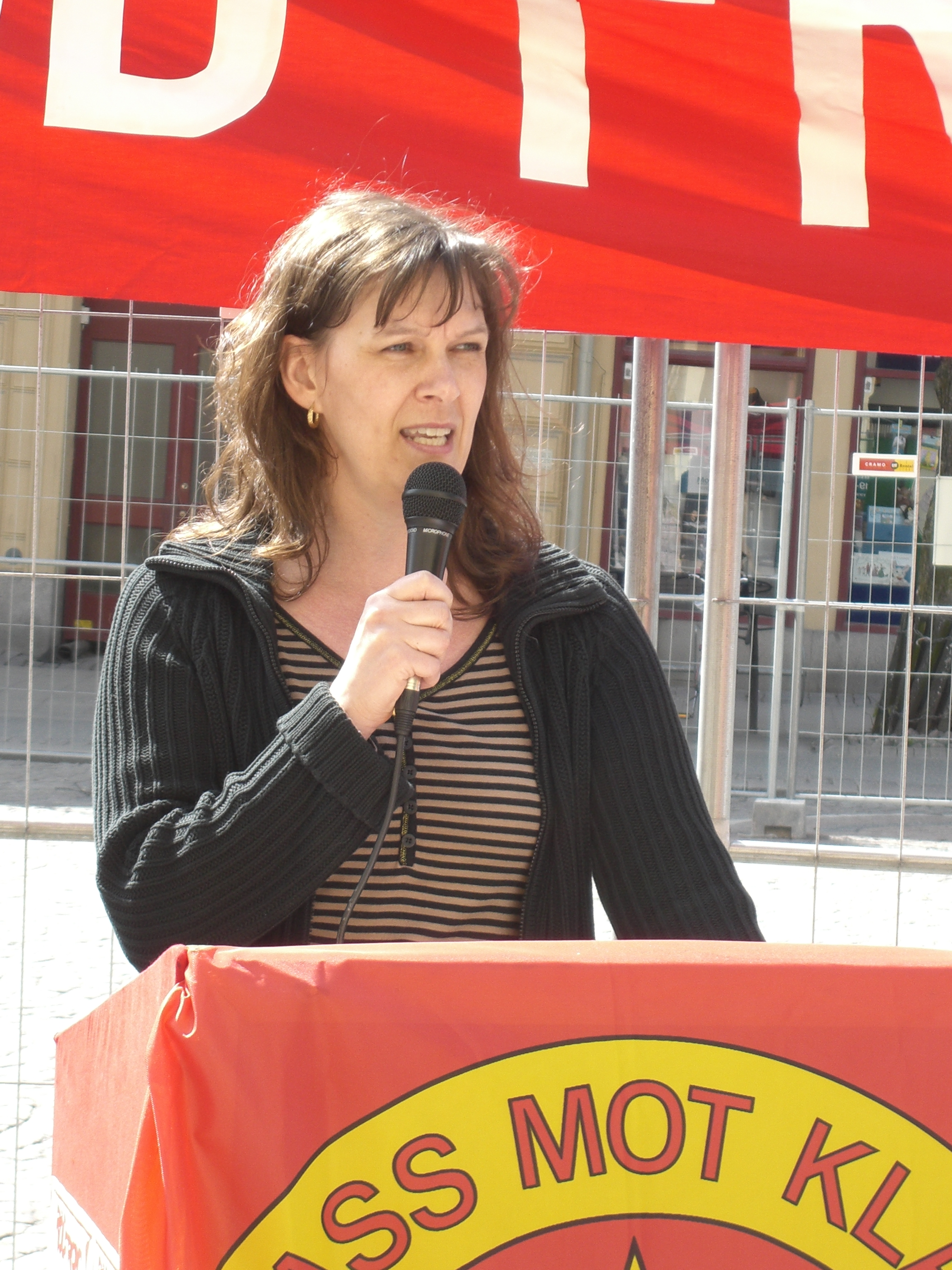 Tal på Röd Front i Örebro, första maj -07